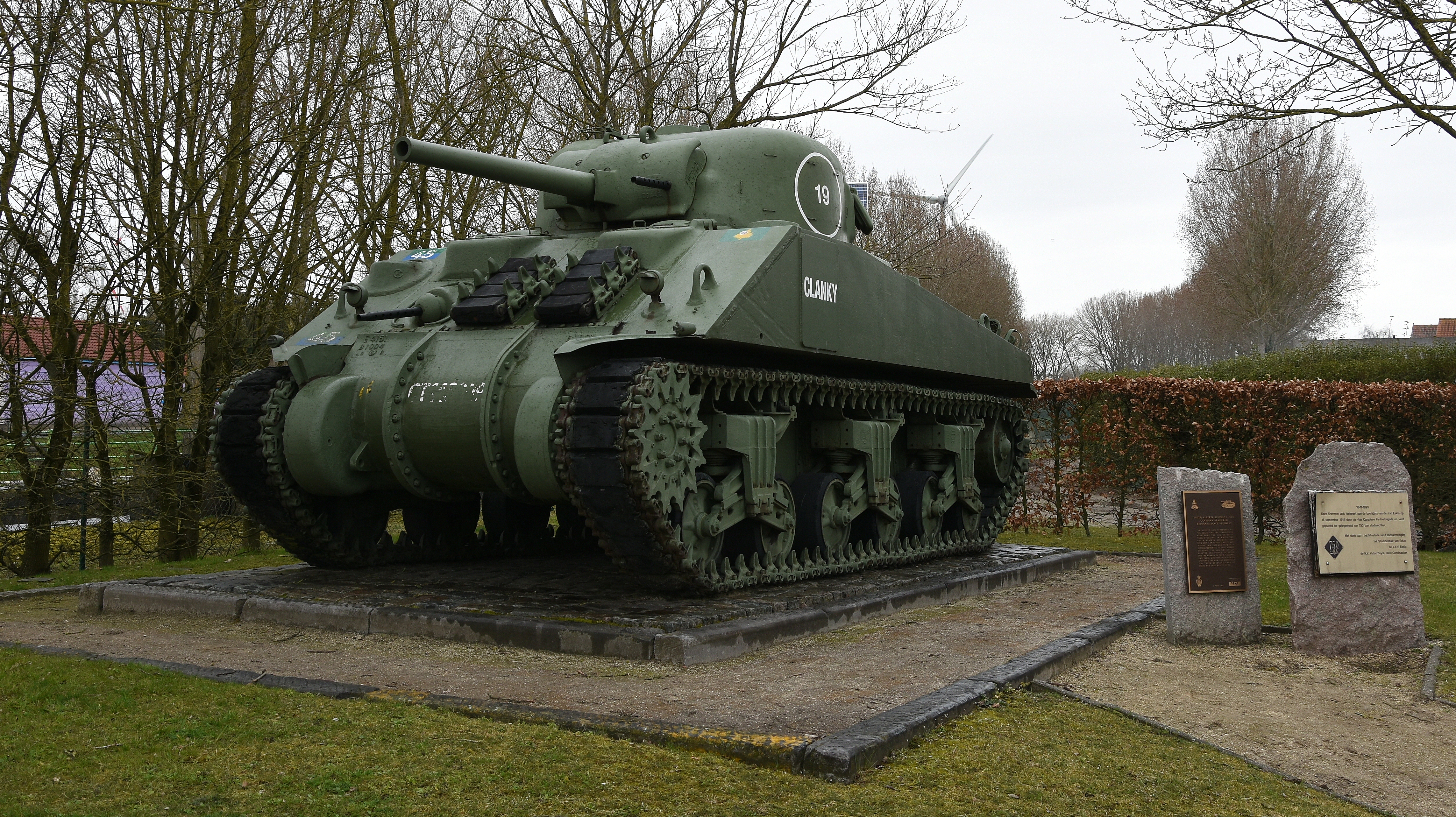 Tankmonument Balgerhoeke, Eeklo - Shermantank van de 4e Canadese pantserbrigade (South Alberta Regiment 29th Canadian Armoured Reconnaissance Regiment) die Eeklo op 15 september 1944 bevrijdde